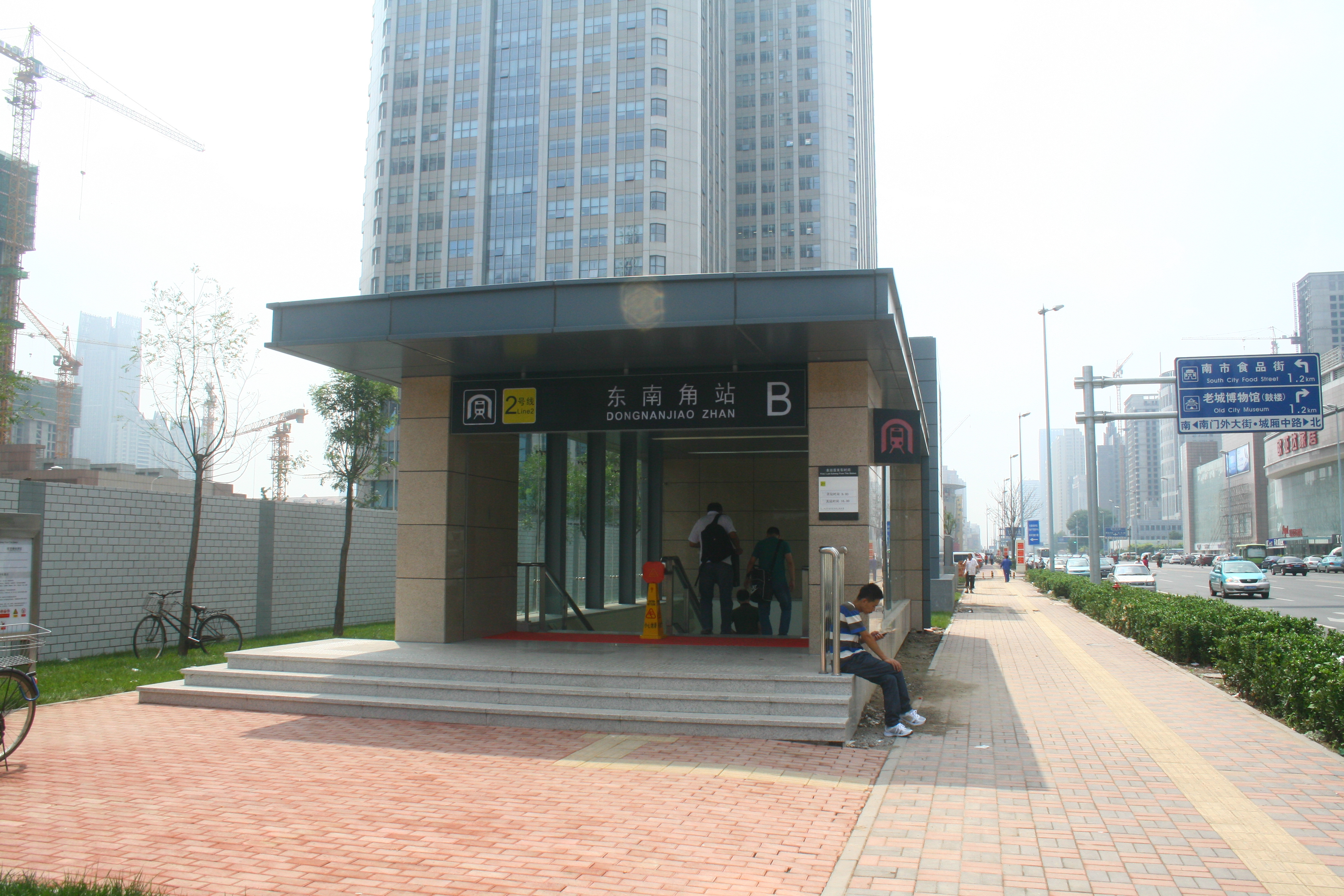 東南角站B出口